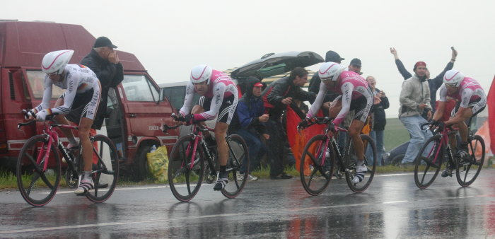 T-Mobile Team, Tour de France 2004